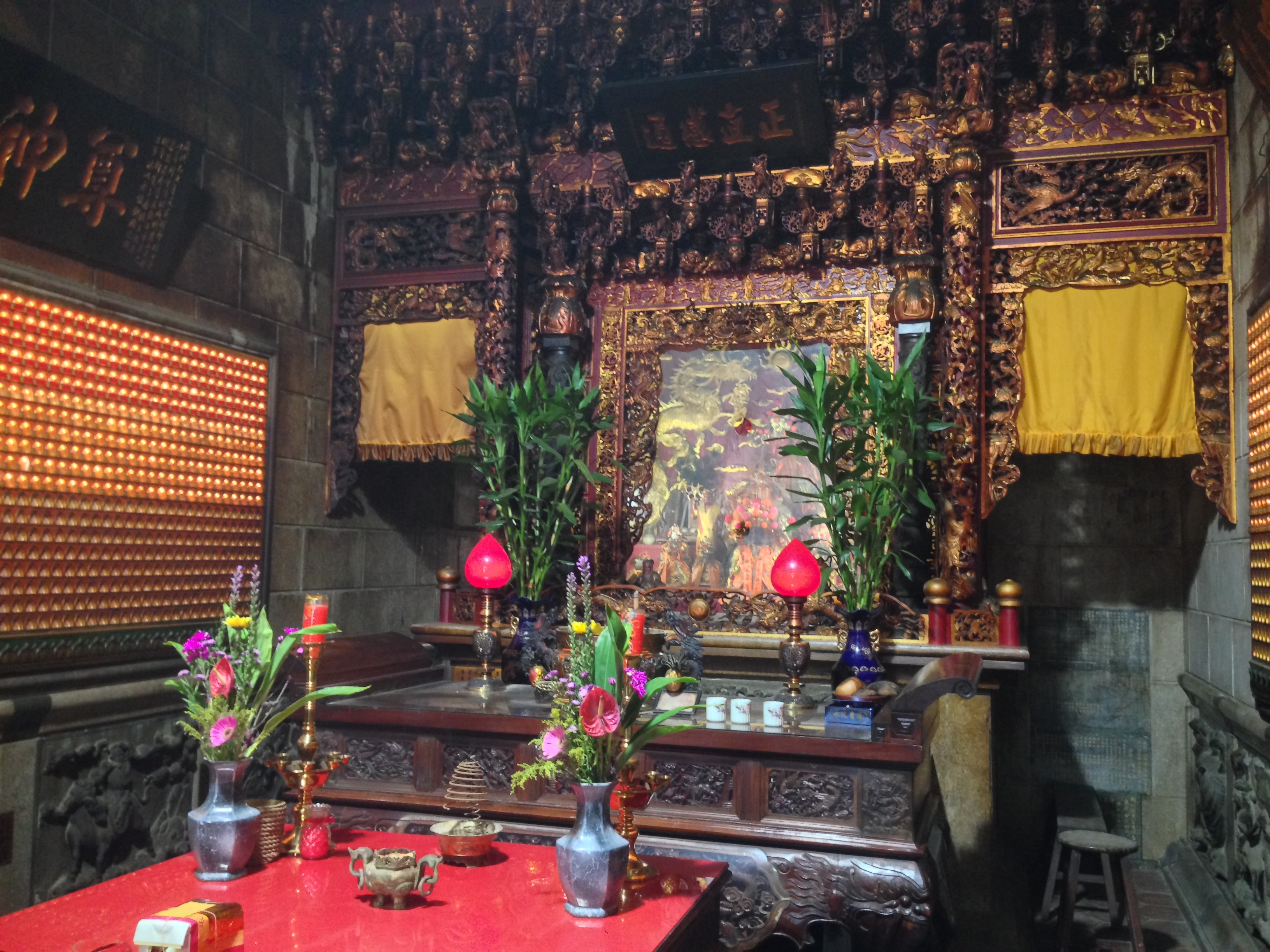 中文（台灣）: 彰化鎮東宮廟內